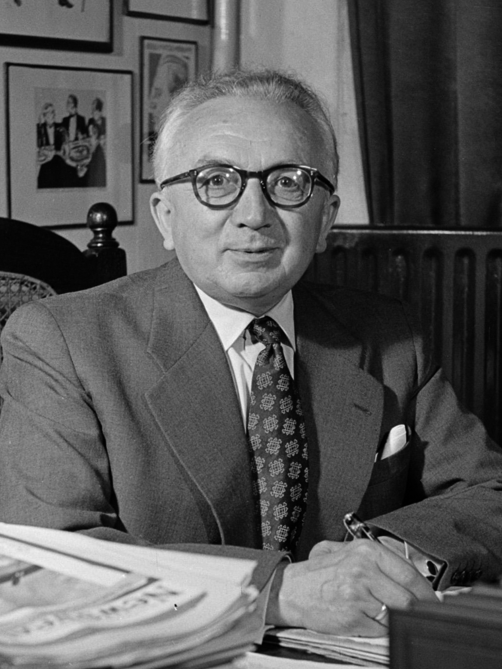 De heer Dellaert aan zijn bureau thuis. Met op de achtergrond foto's en karikaturen. De heer Dellaert (1893-1960) was directeur van de KLM van 1950 tot 1960 mei 1954